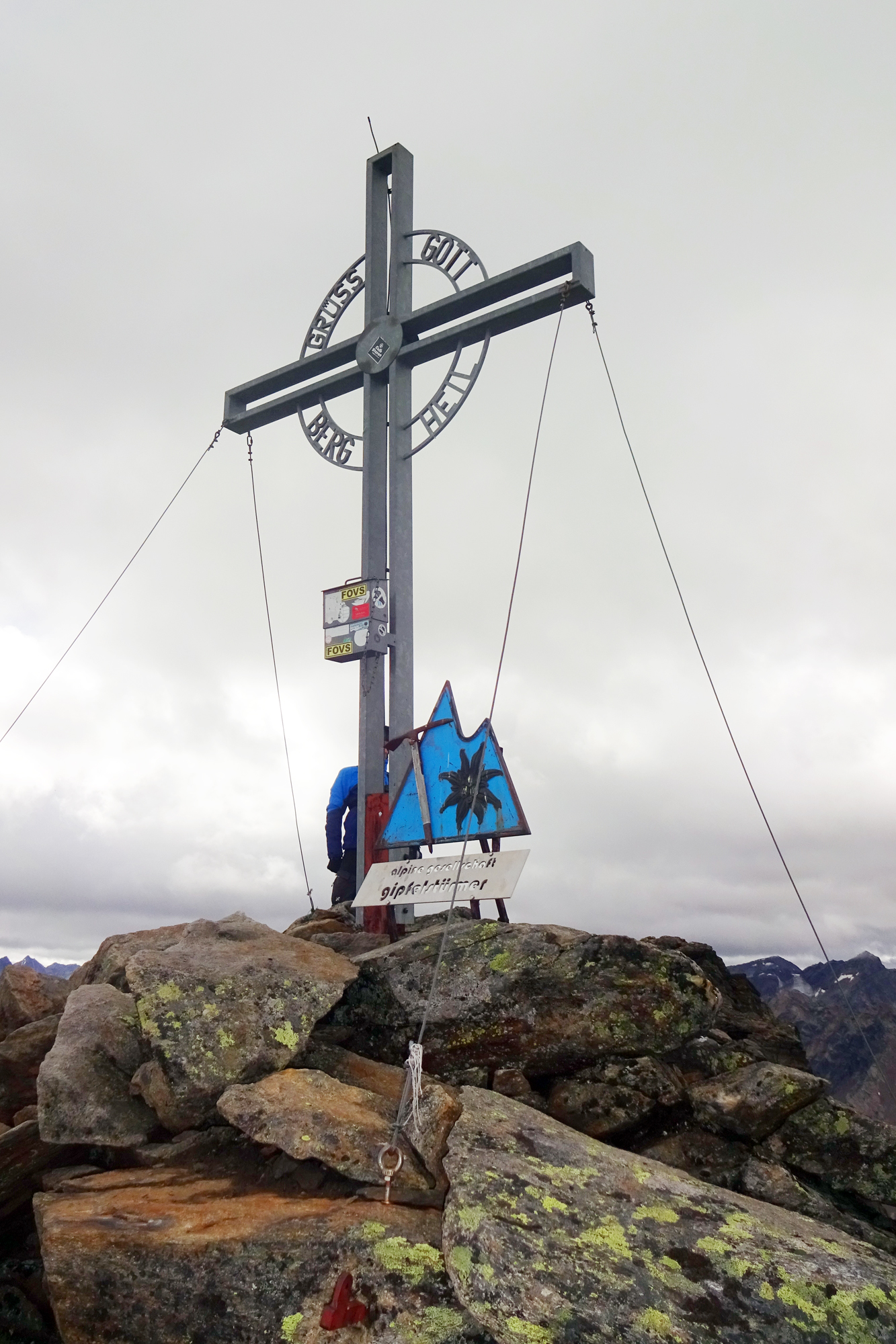 Stubaier Alpen: Gipfelkreuz auf dem Zwieselbacher Rosskogel, September 2018